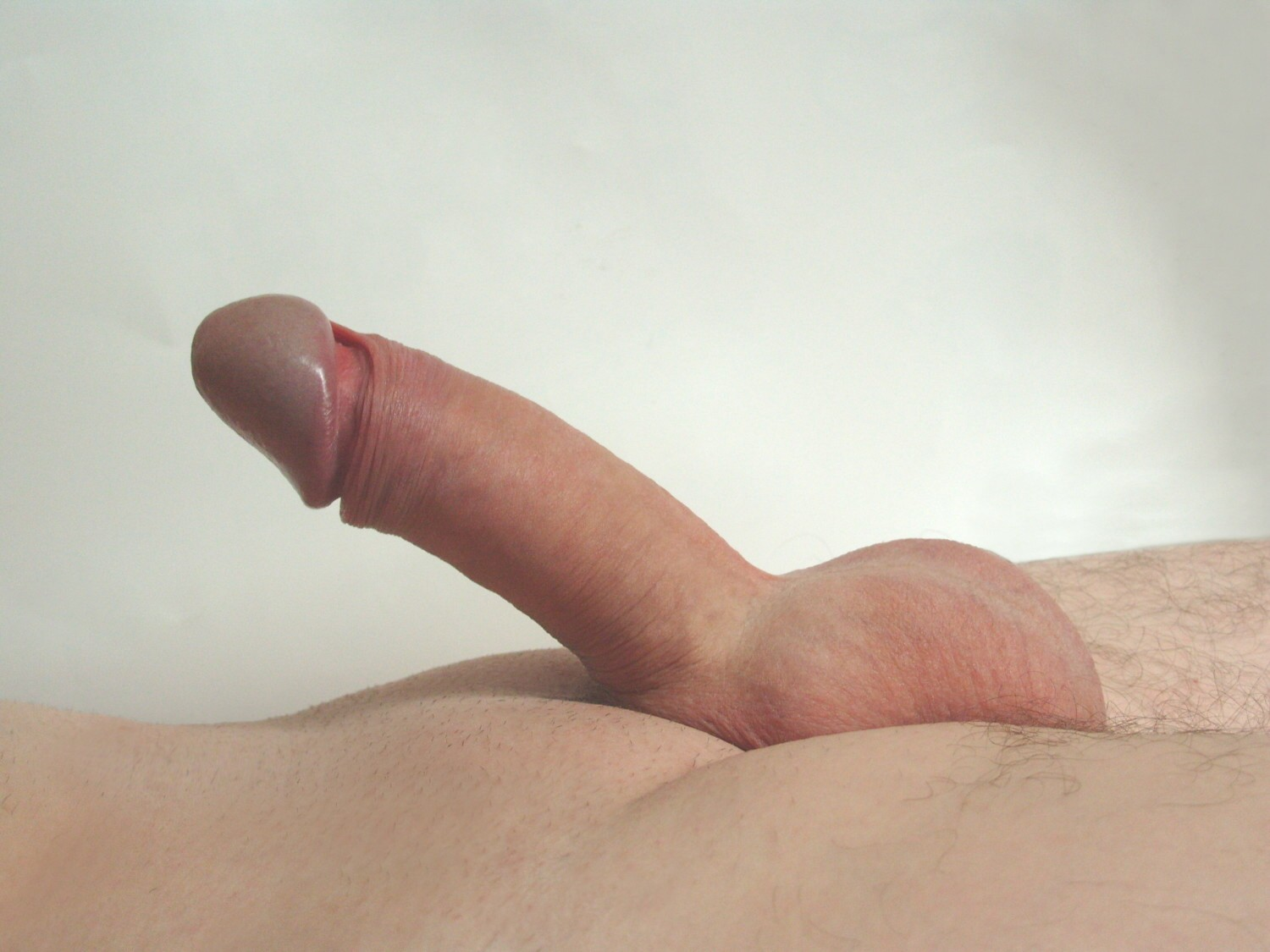 pénis en érection